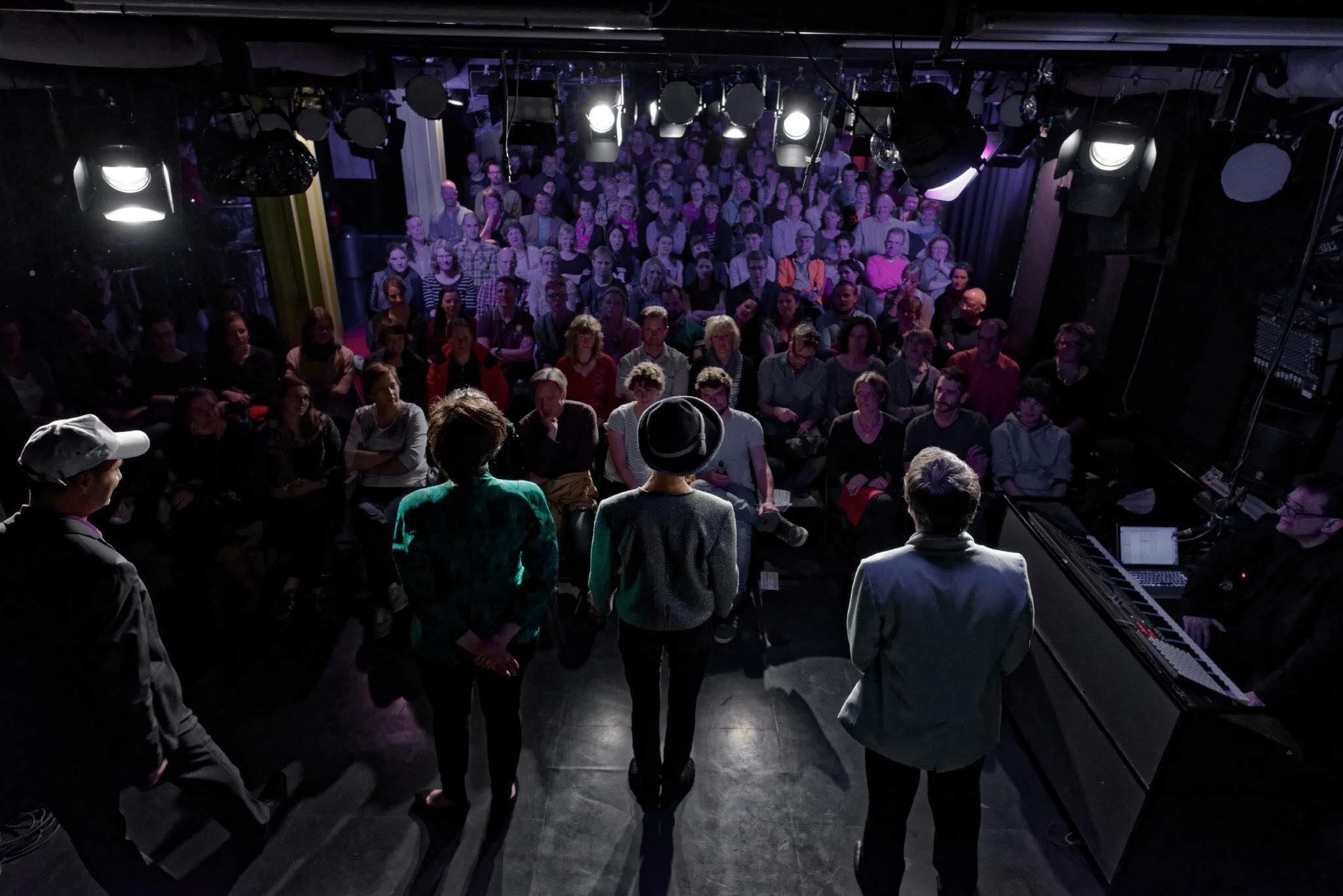 Impro-Spieler des Berliner Ensembles "Die Gorillas" auf der Bühne ihrer Kreuzberger Stammbühne, dem Ratibor Theater